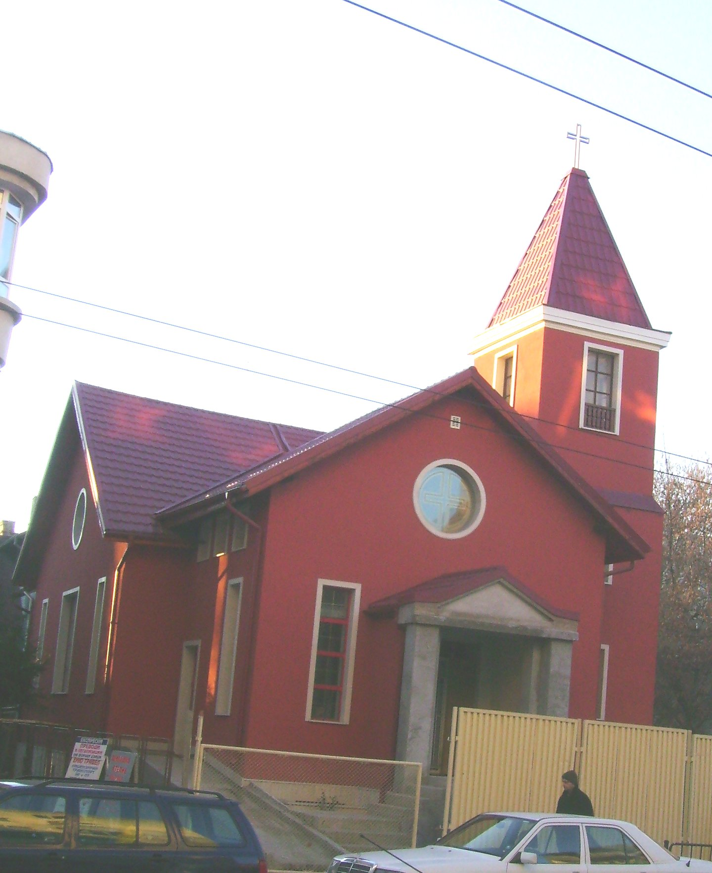 Методистка църква / Methodist church